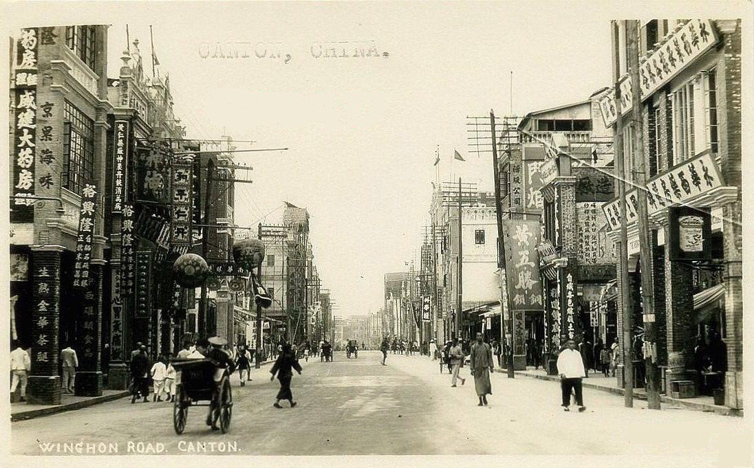 廣州市永漢路。照片使用粵音「Wing Hon」標註。